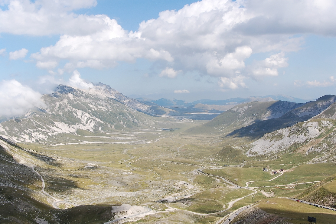 Campo Imperatore 2011